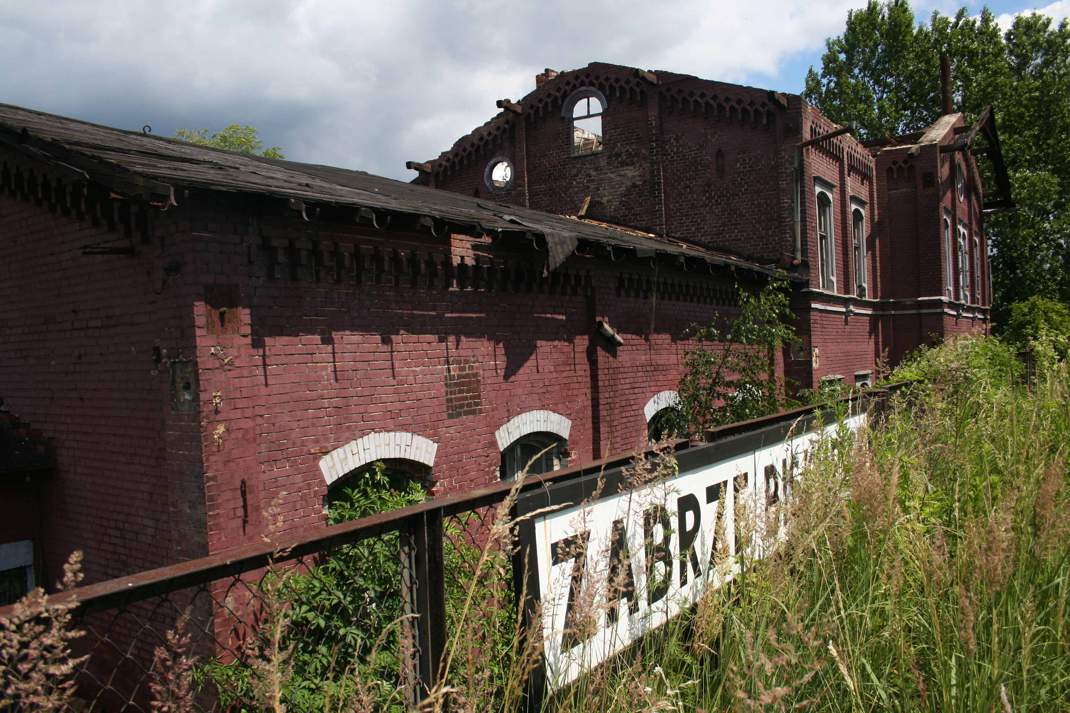 Tour de Wongiel. Wycieczka kolejowa po terenach przemysłowych Górnego Śląska.